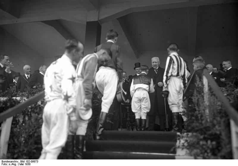 Hindenburg-Rennen in Hoppegarten! Zu Ehren des Reichspräsidenten von Hindenburg wird alljährlich ein "Hindenburg-Rennen" in Hoppegarten bei Berlin veranstaltet. Unser Bild zeigt den Reichspräsidenten von Hindenburg bei der Verteilung des Ehrenpreises an den Sieger des Rennens.